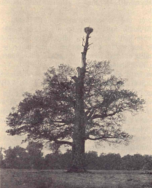 Dub s čapím hnízdem u zámku Lány (Pohansko u Břeclavi)